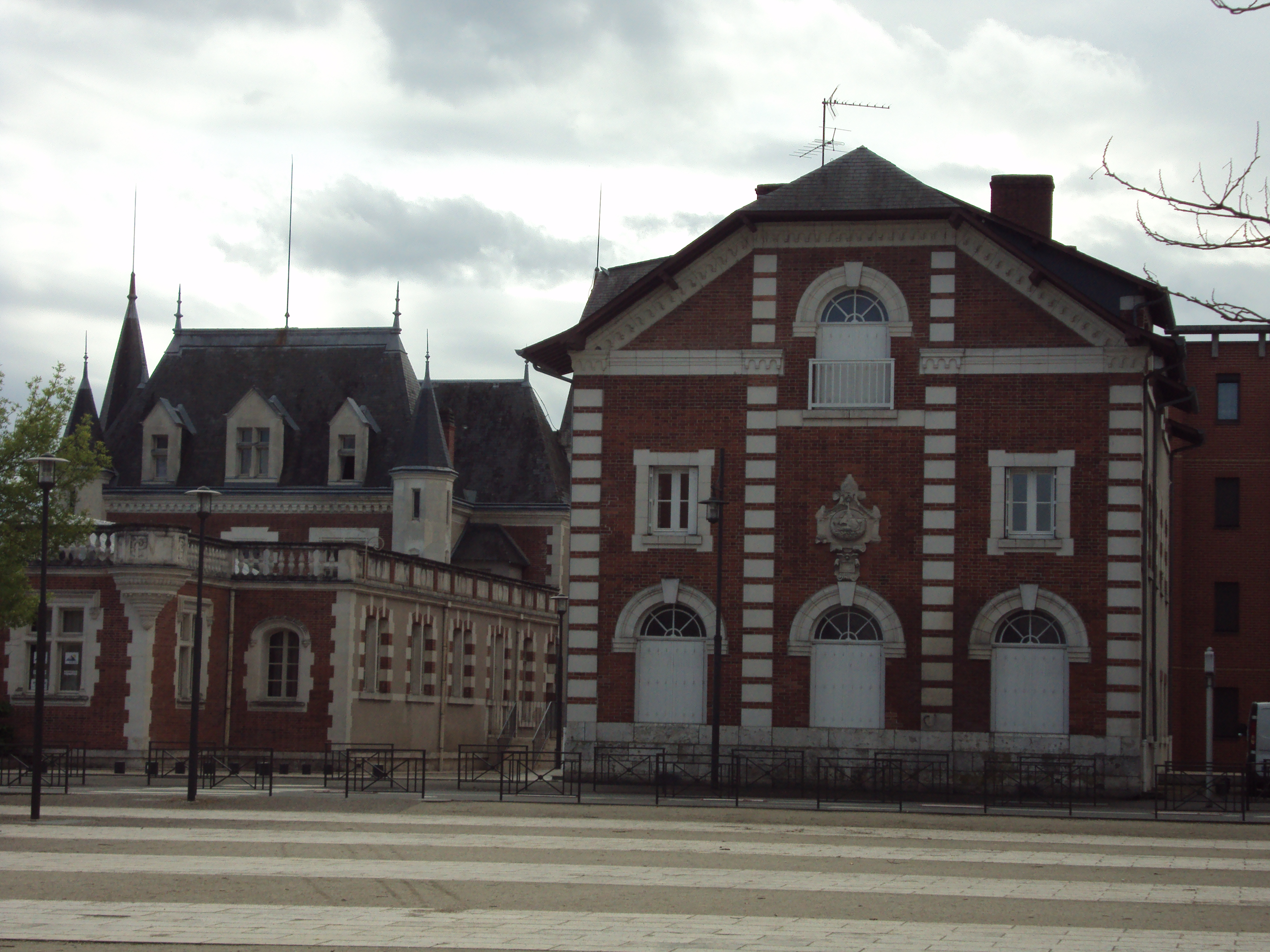 Ancienne chocolaterie Poulain